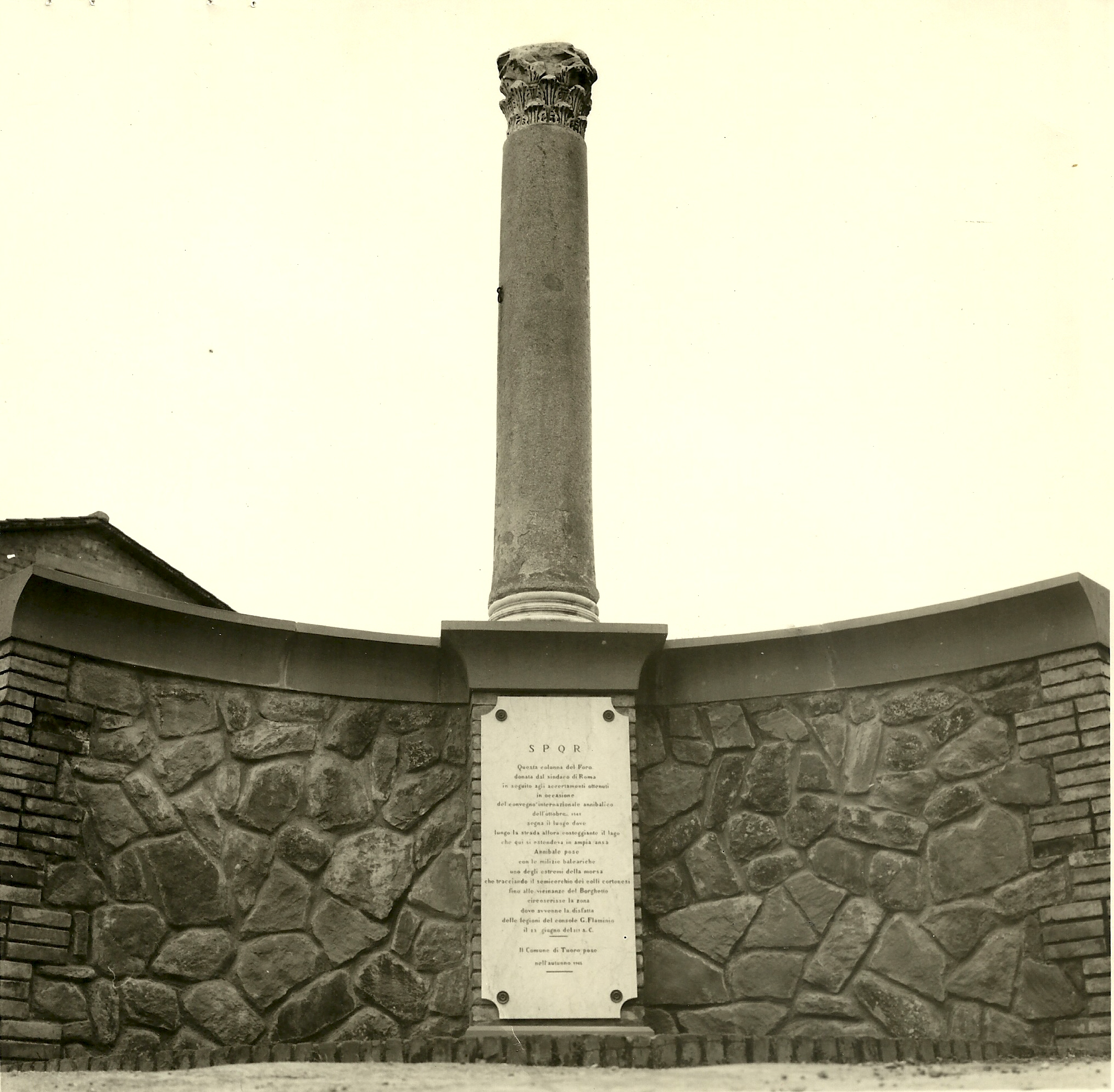 La colonna, donata dalla città di Roma, in memoria della Battaglia del Trasimeno e posata presso l'incrocio tra Via Annibale Cartaginese e Via del Porto in occasione del convegno internazionale annibalico del 1961. Il luogo venne ritenuto significativo poichè la teoria del Prof. G. Susini identificava in esso un fulcro della mischia.